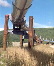 Trans-Alaska Pipeline